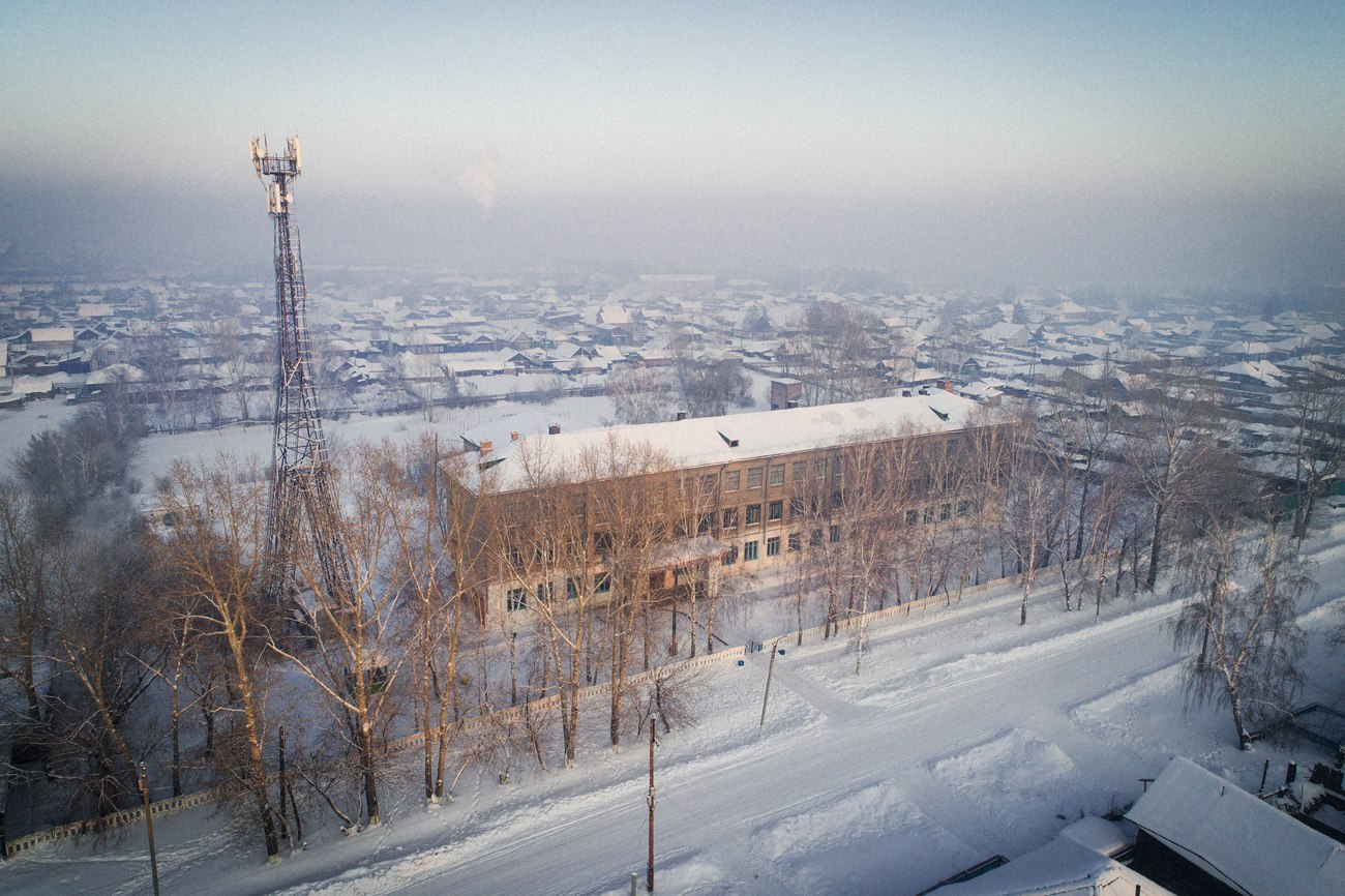 Школа имени Василия Салко